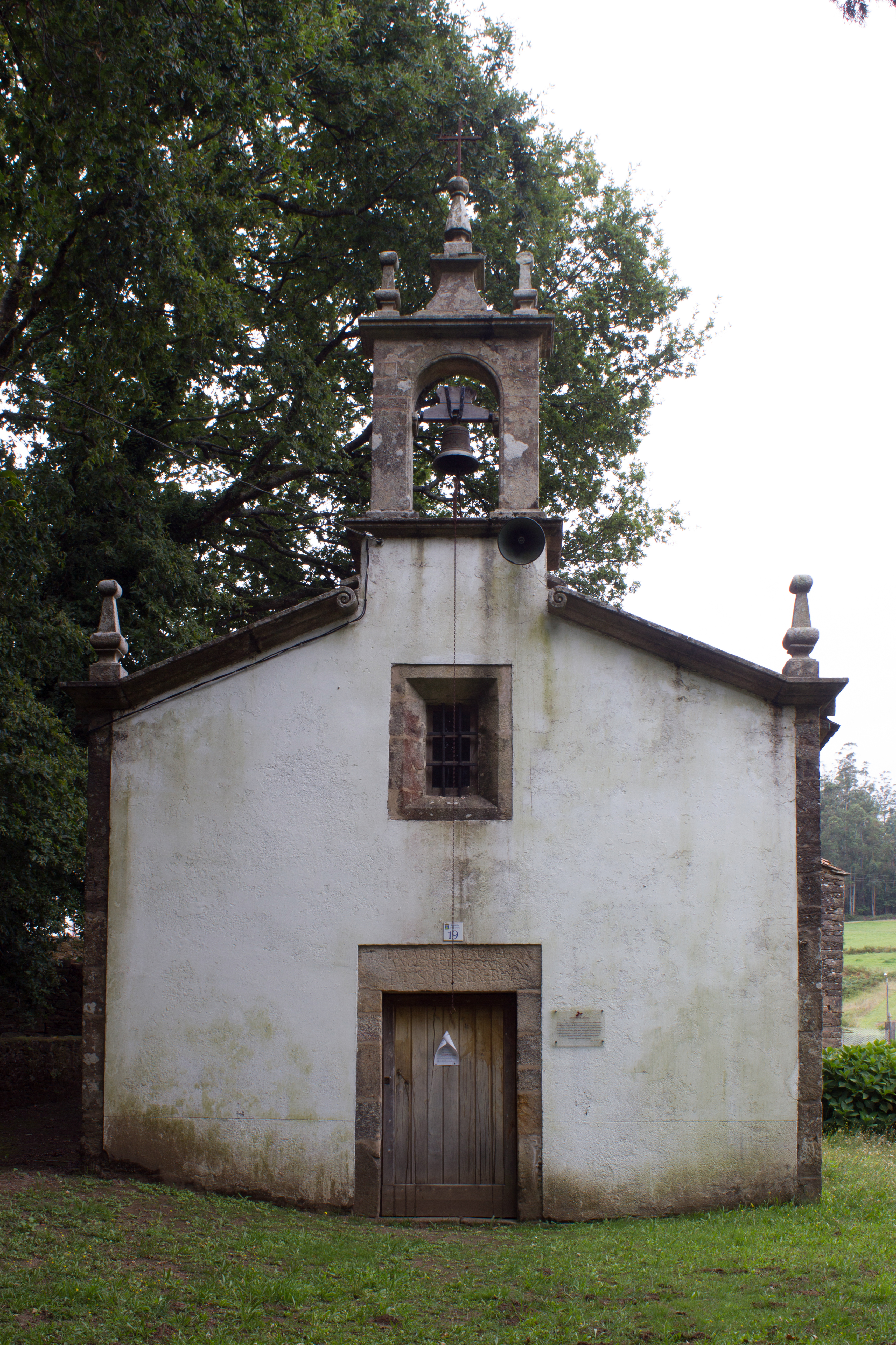 Capela de San Bieito, no lugar de Rodiño Grande do concello de Boqueixón.